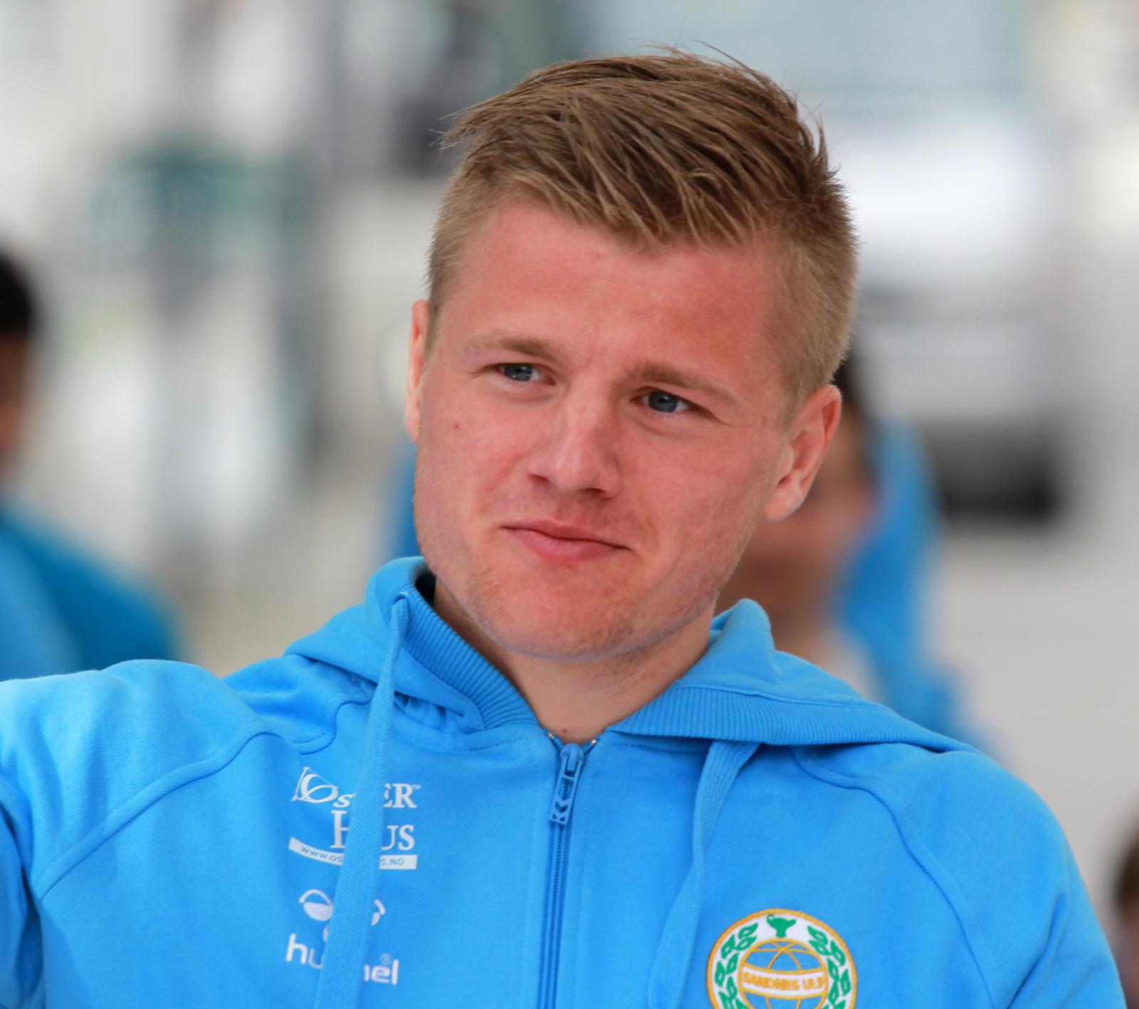 Fredrik Midtsjø foran 2014 sesongen for Sandnes Ulf